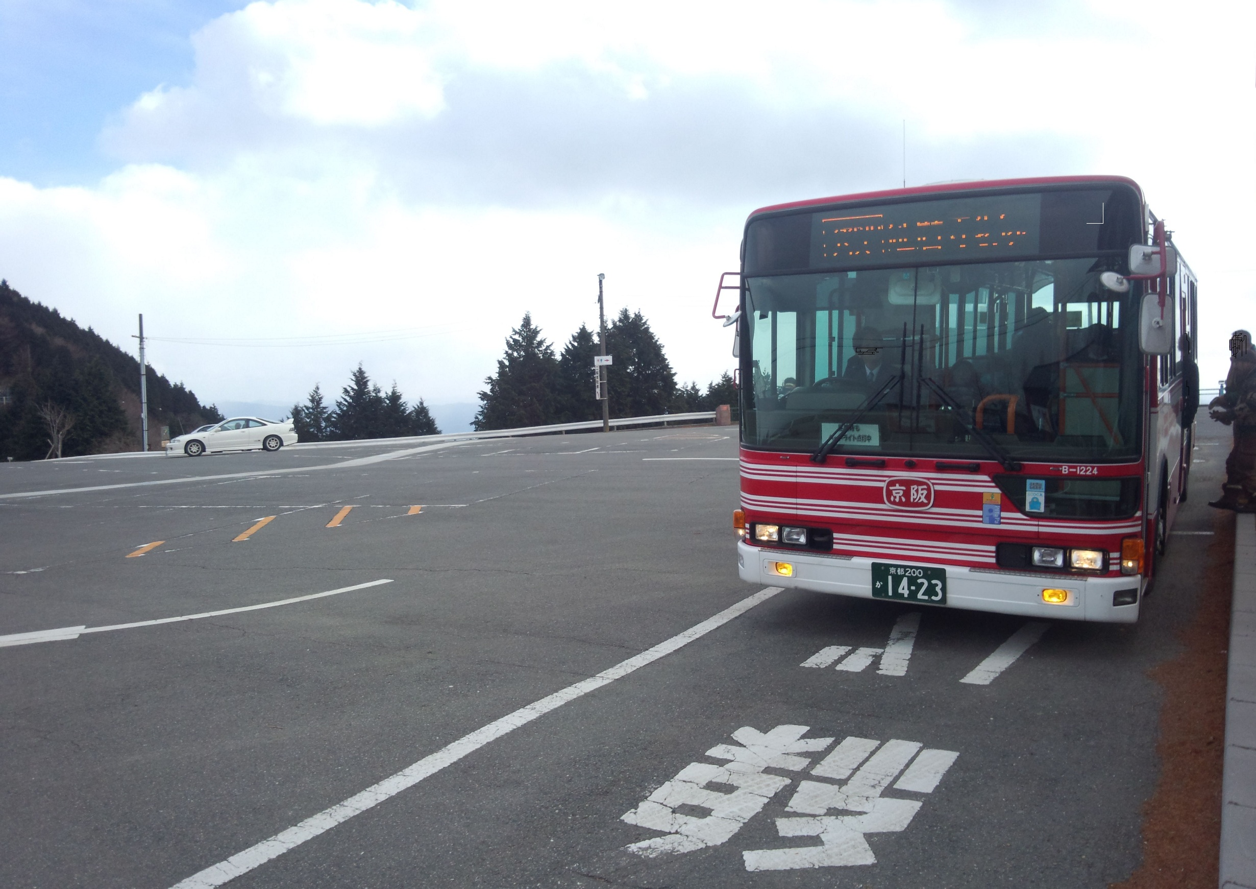 比叡山山頂バスターミナルにて